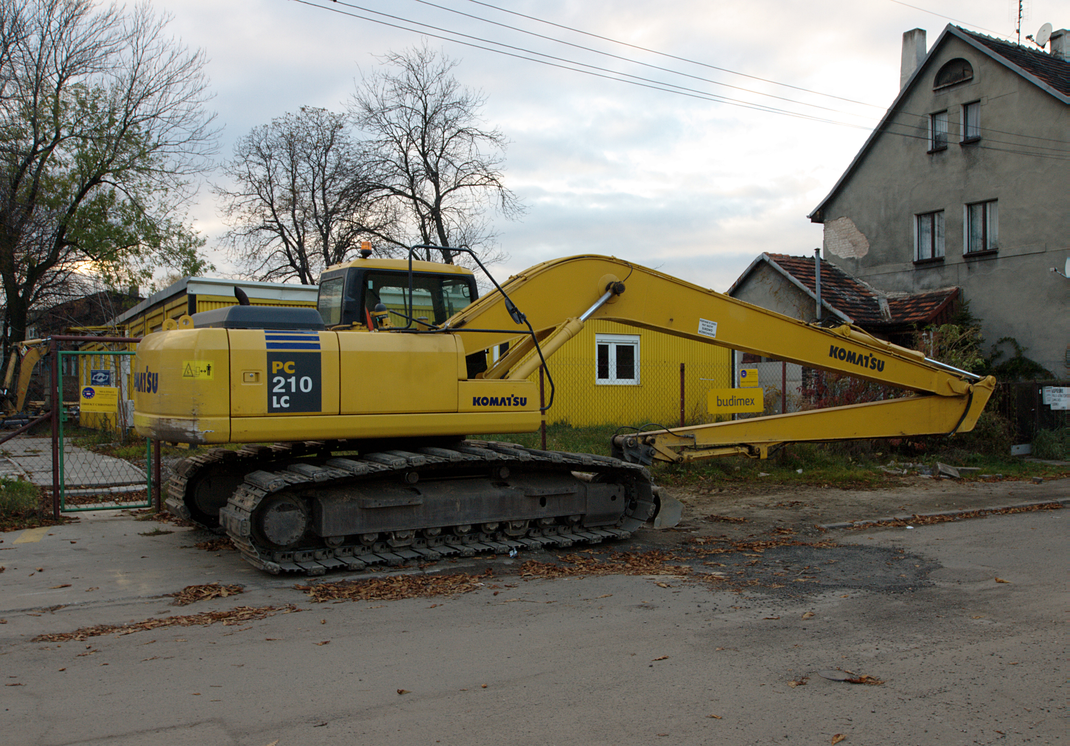 Komatsu PC210LC stojące na ulicy Rostka w Zabrzu.